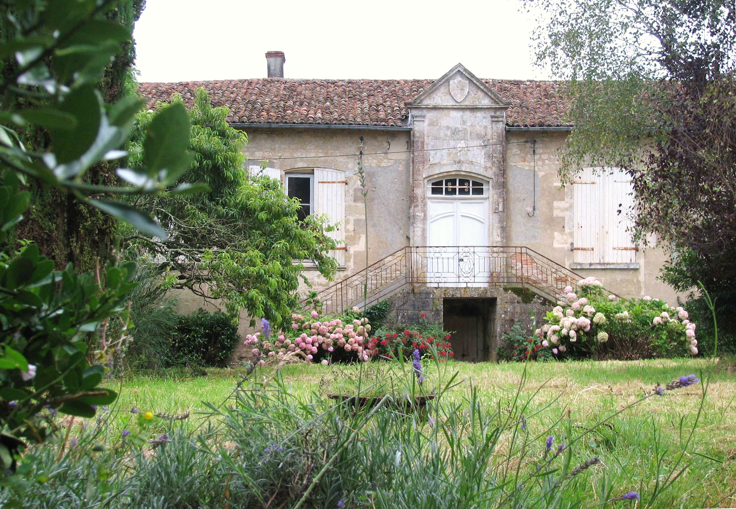 Château du bourg - Cour intérieure